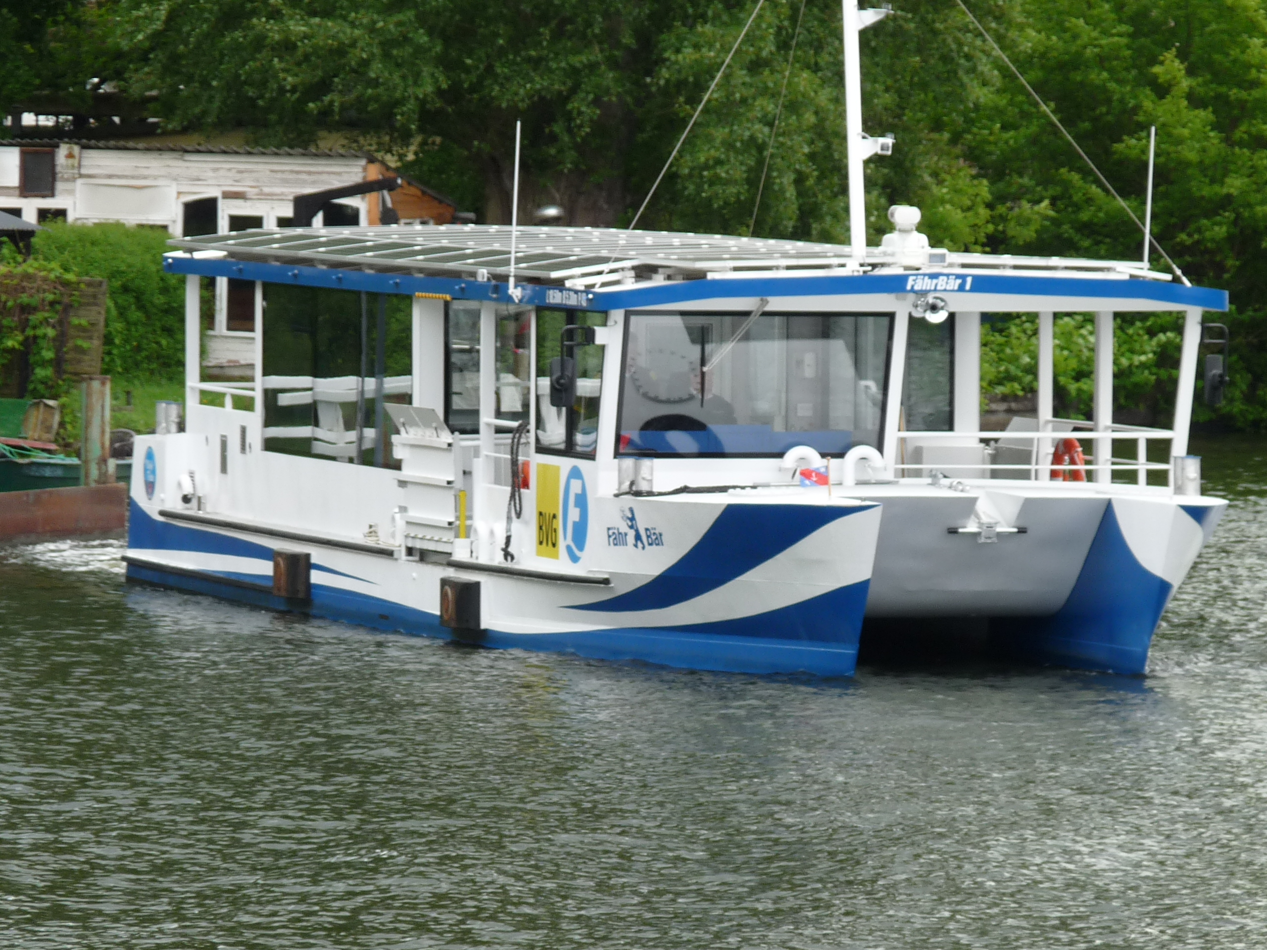 Die Elektrofähre Fähr-Bär 1 der Linie F 11 in Berlin.